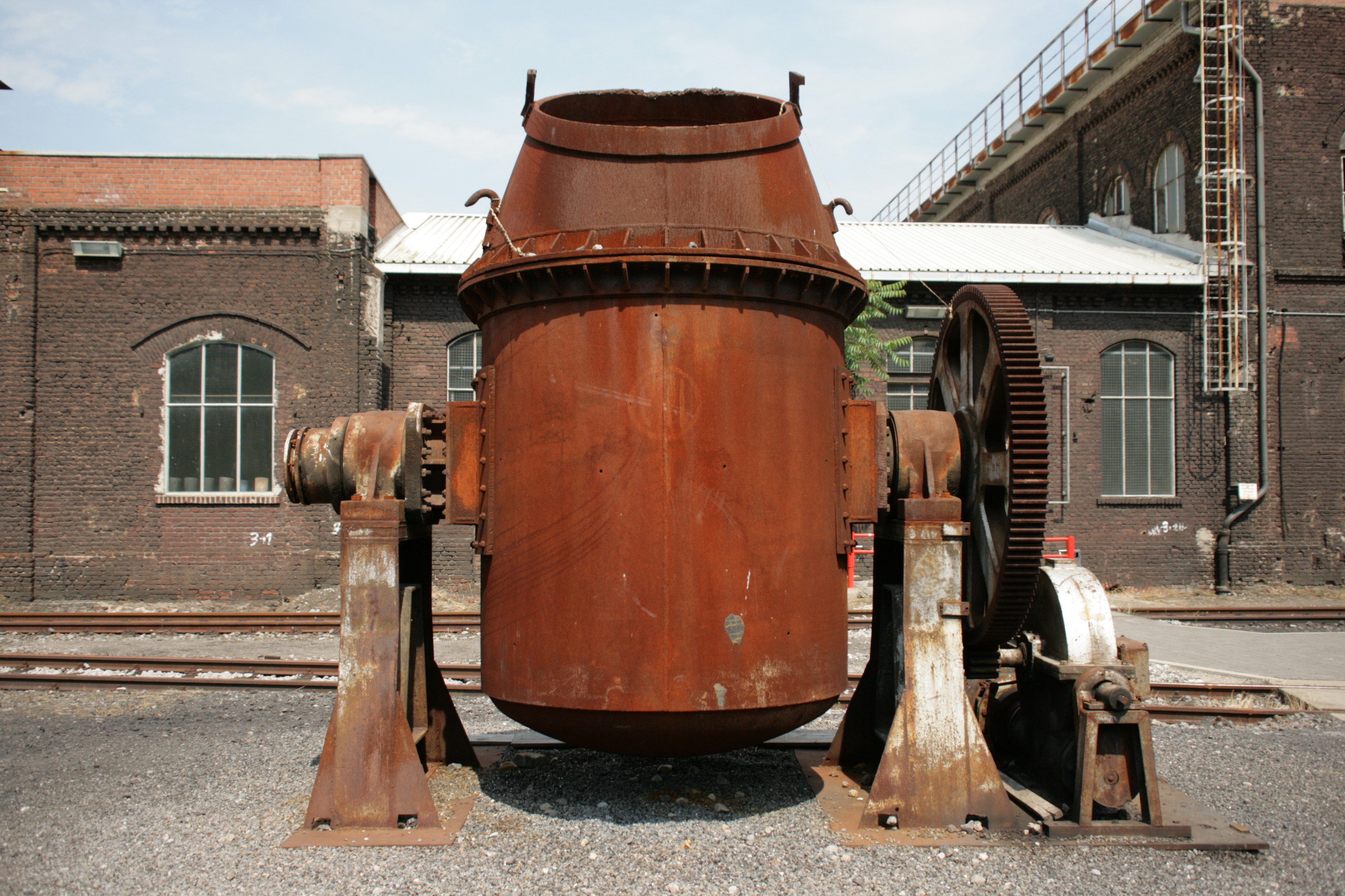 Henrichshütte in Hattingen